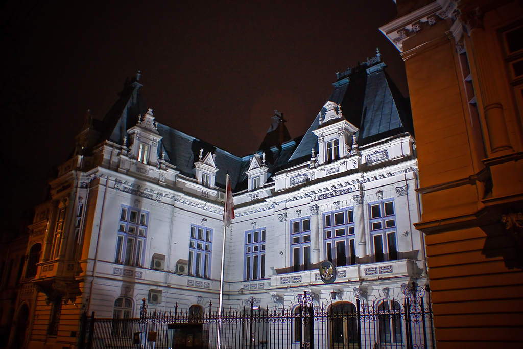 ambasada indoneziei 2 str gina patrichi 10